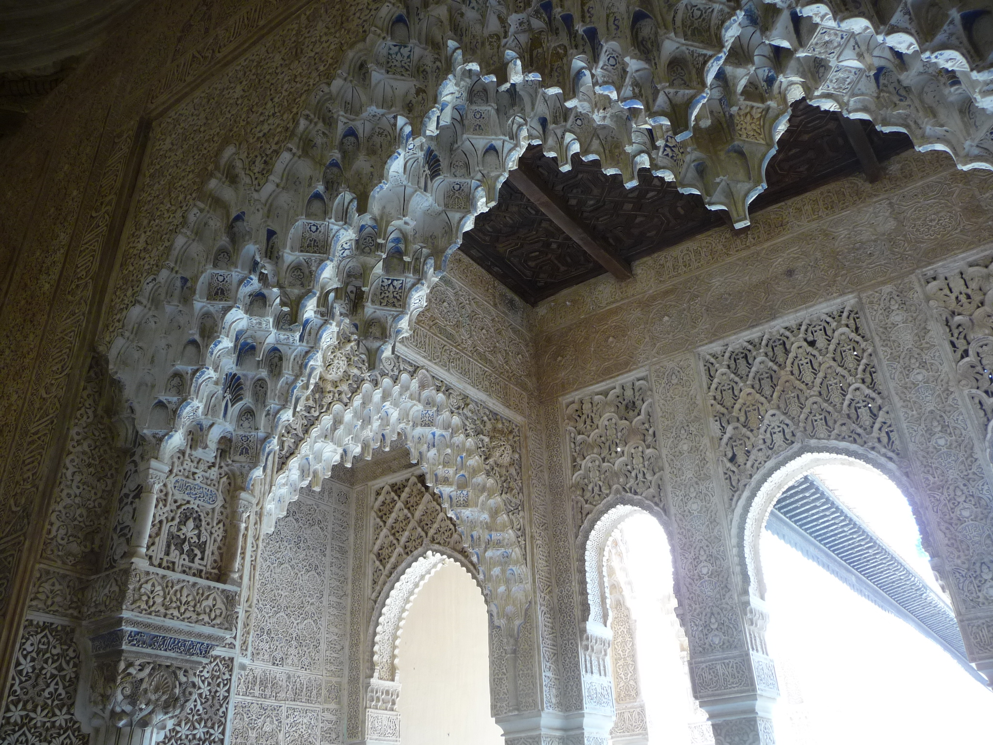 Granada-P1050043.JPG